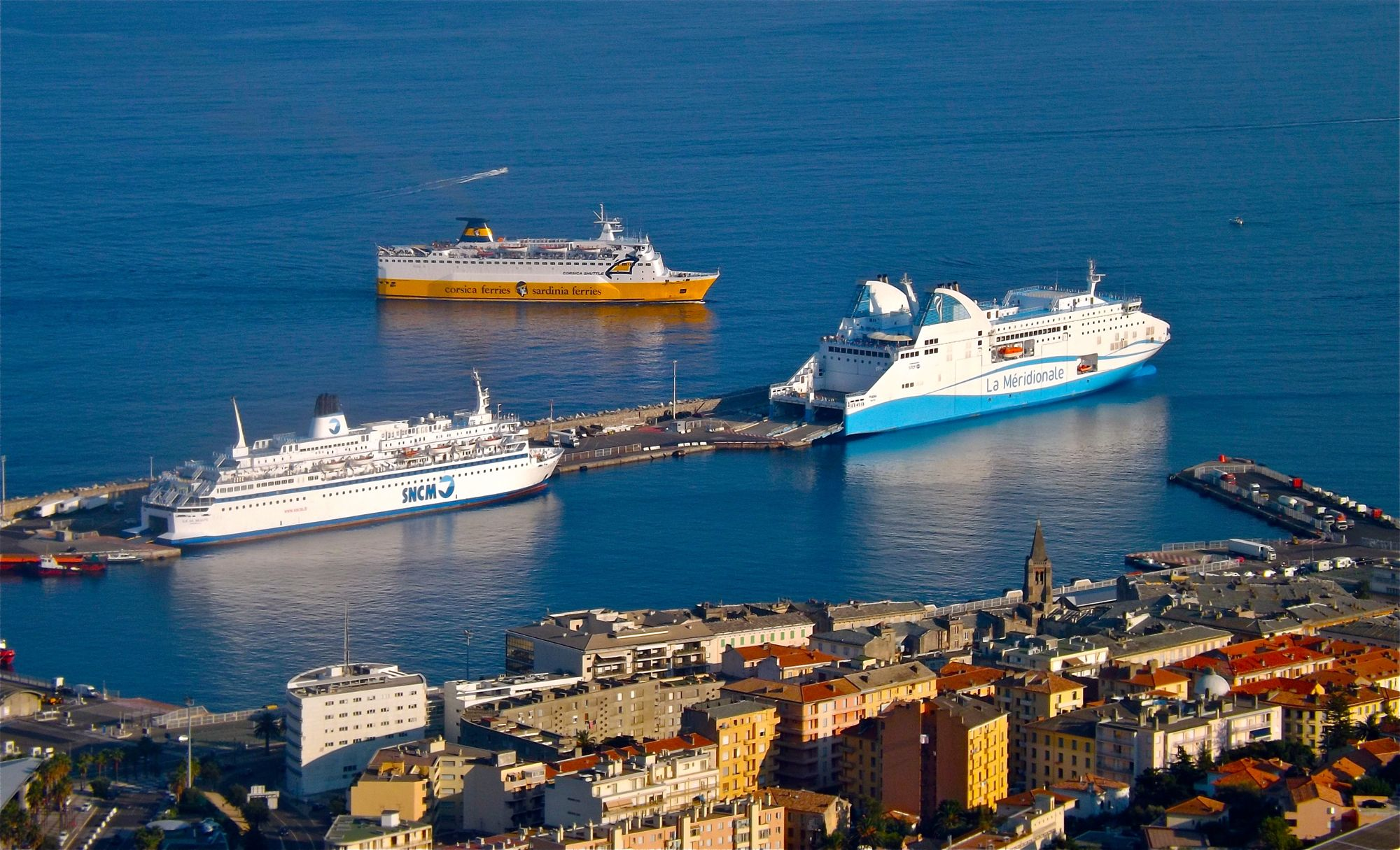 Le port de Bastia, avec les Île de Beauté (SNCM), Corsica Marina (Corsica Ferries), et Piana (La Méridionale).